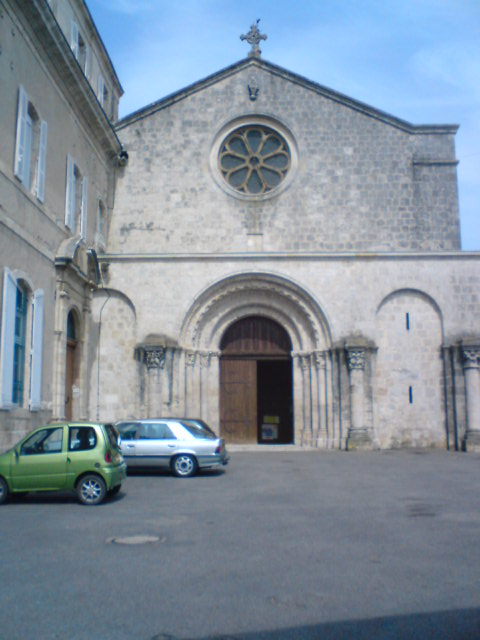 Église Saint-Martin de Layrac (47)